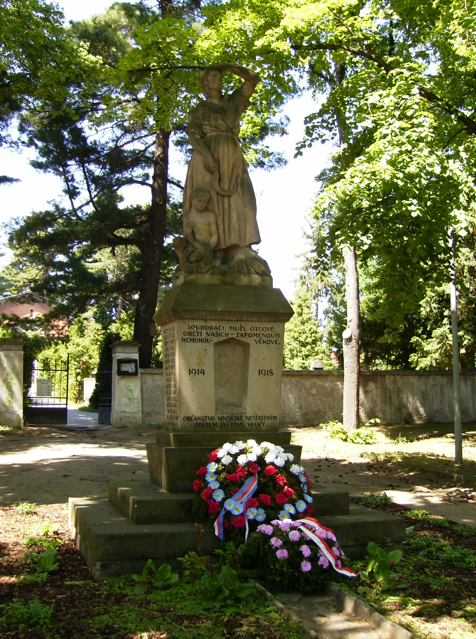 Pomník obětem 1. světové války před hřbitovem ve Vinoři.